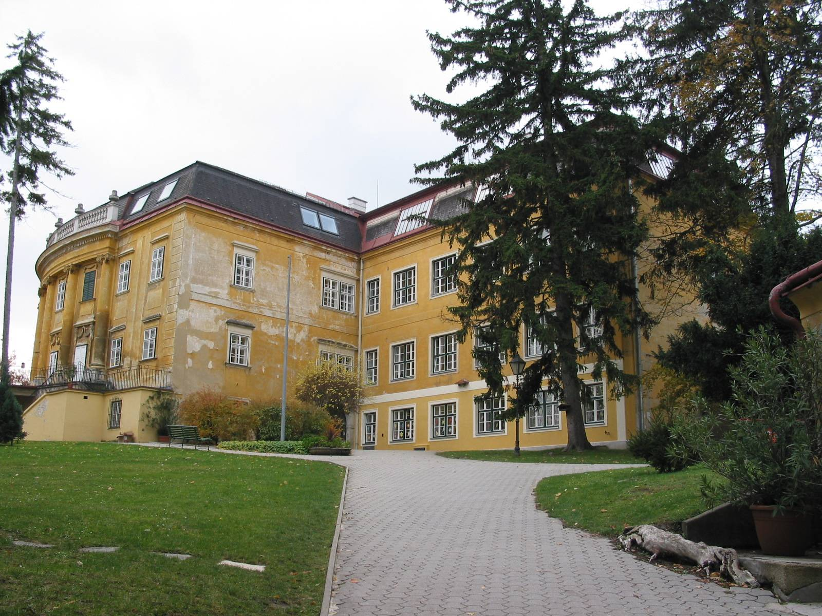 Schloss Rodaun en: Palace of Rodaun